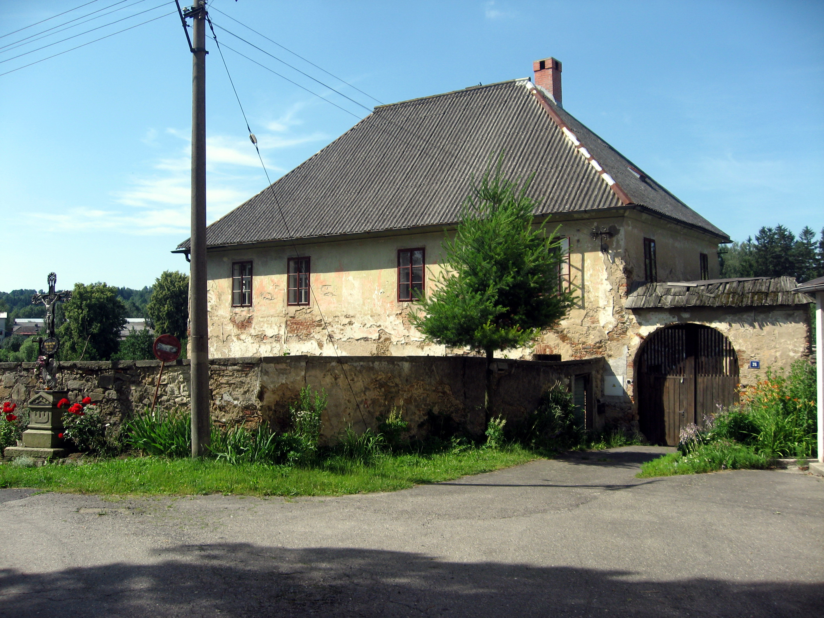 Krásná Hora, fara čp. 25.